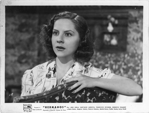 Hermanos (1939). Fotografía blanco y negro sobre papel fotográfico brillante, con marco perimetral blanco, con los datos del film impresos, en el borde inferior. Plano corto de la actriz Amelia bence.